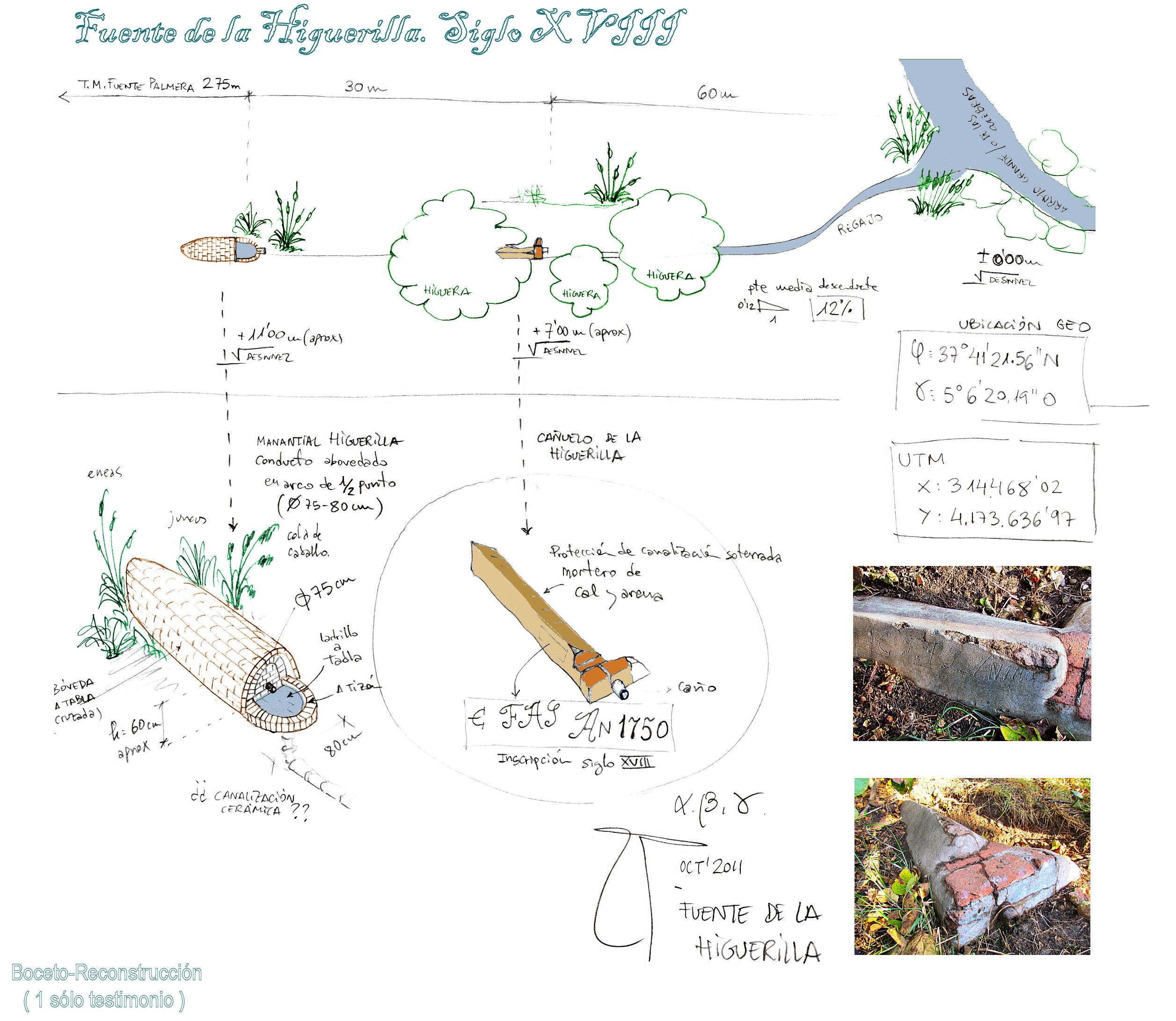 Detalle del croquis de la Fuente la Higuerilla creado por el arquitecto colono Alejandro G. D.